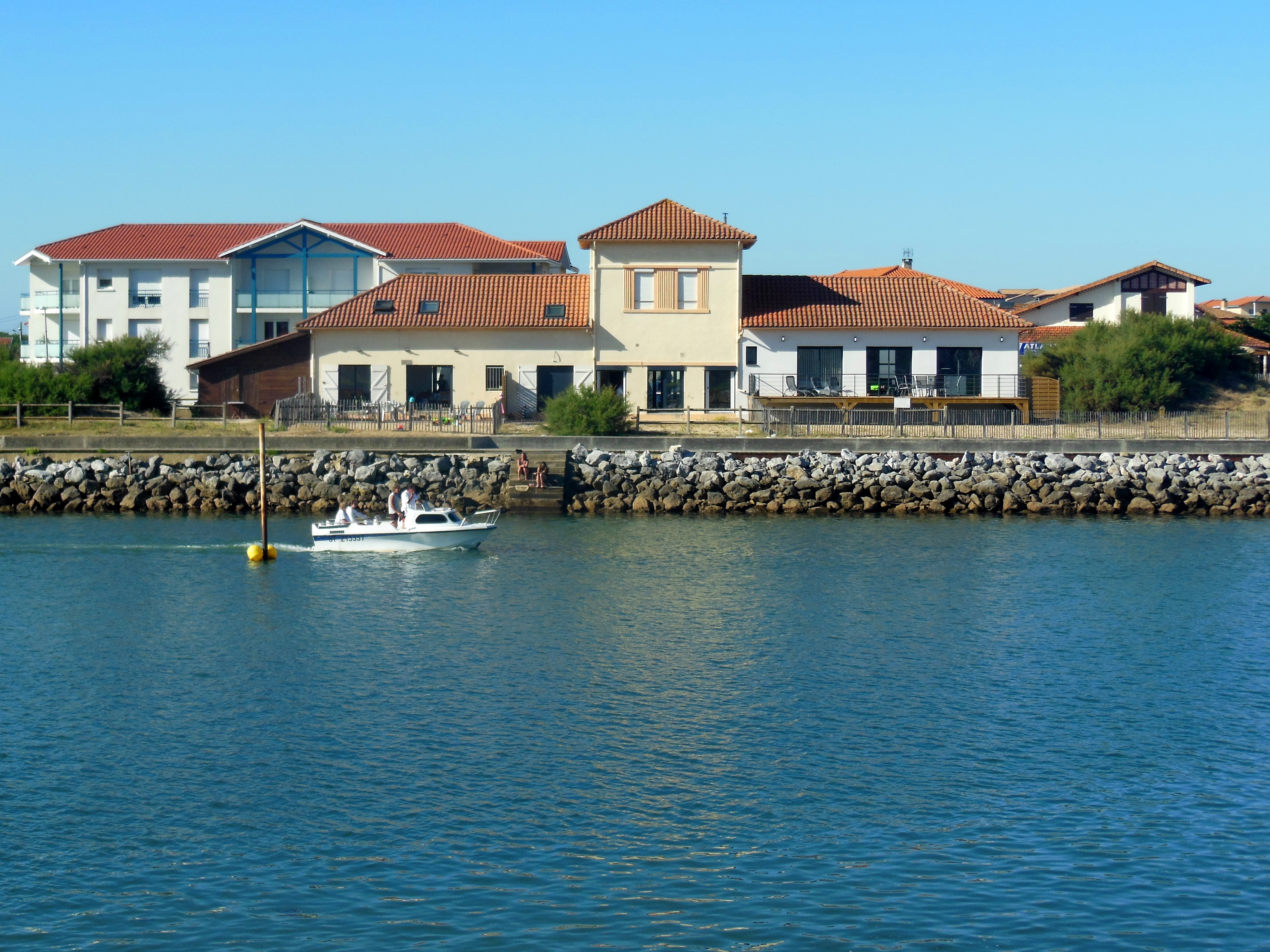 Hydrothérapie de Mimizan, sur les bords du Courant (département français des Landes)